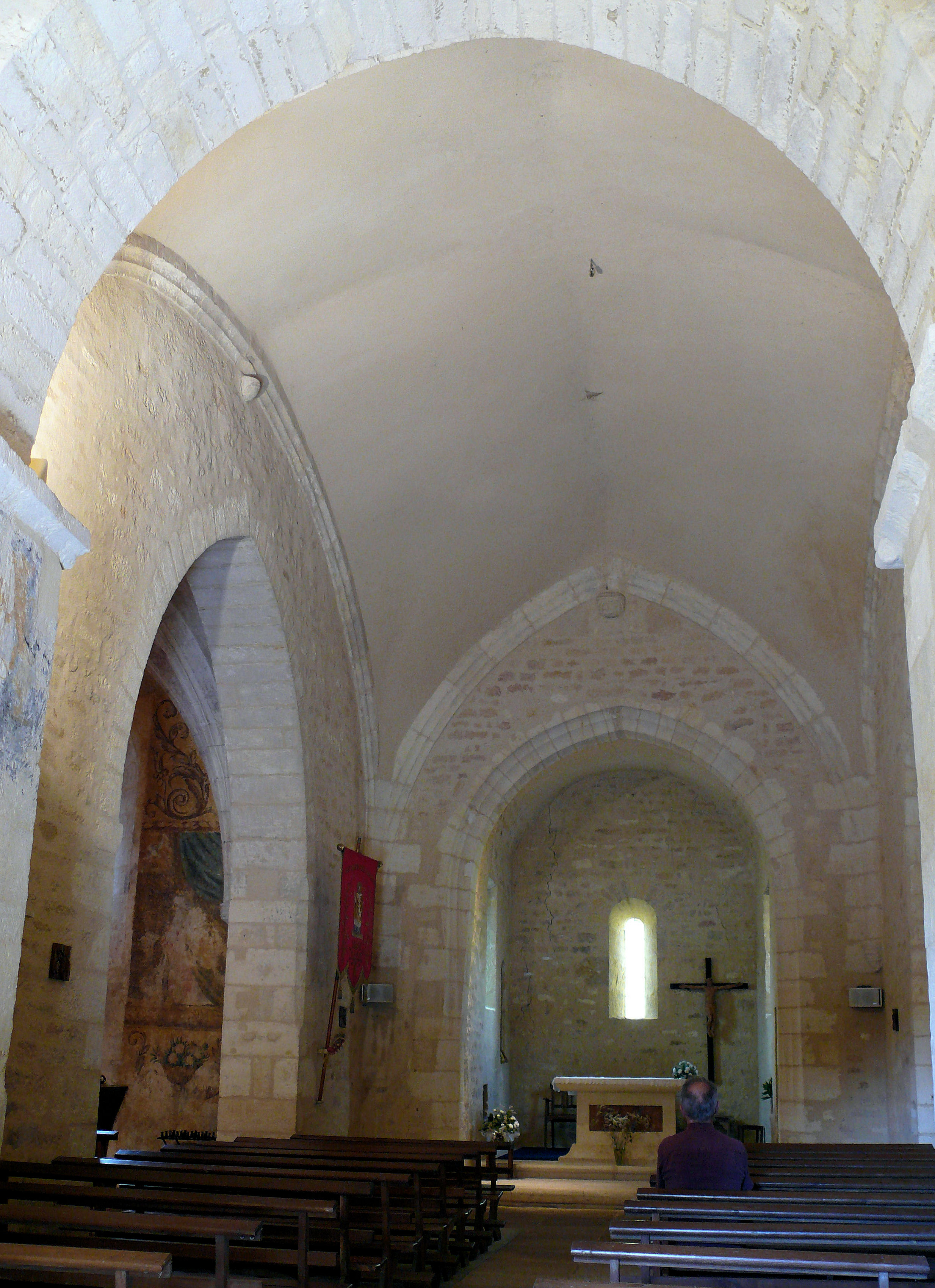 Vitrac - Eglise Saint-Martin - Nef et chapelle nord